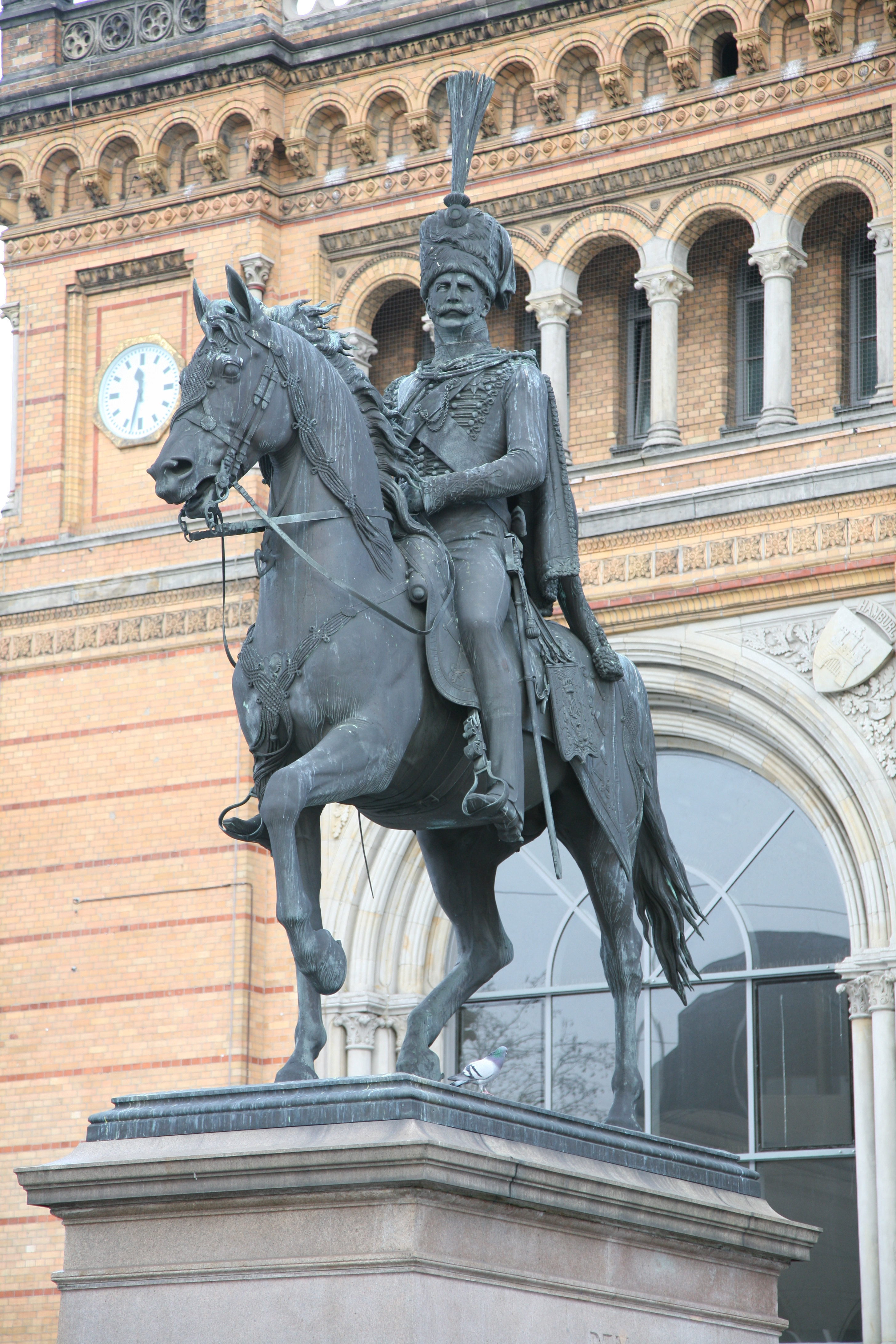 Ernst-August statue in Hannover, Germany